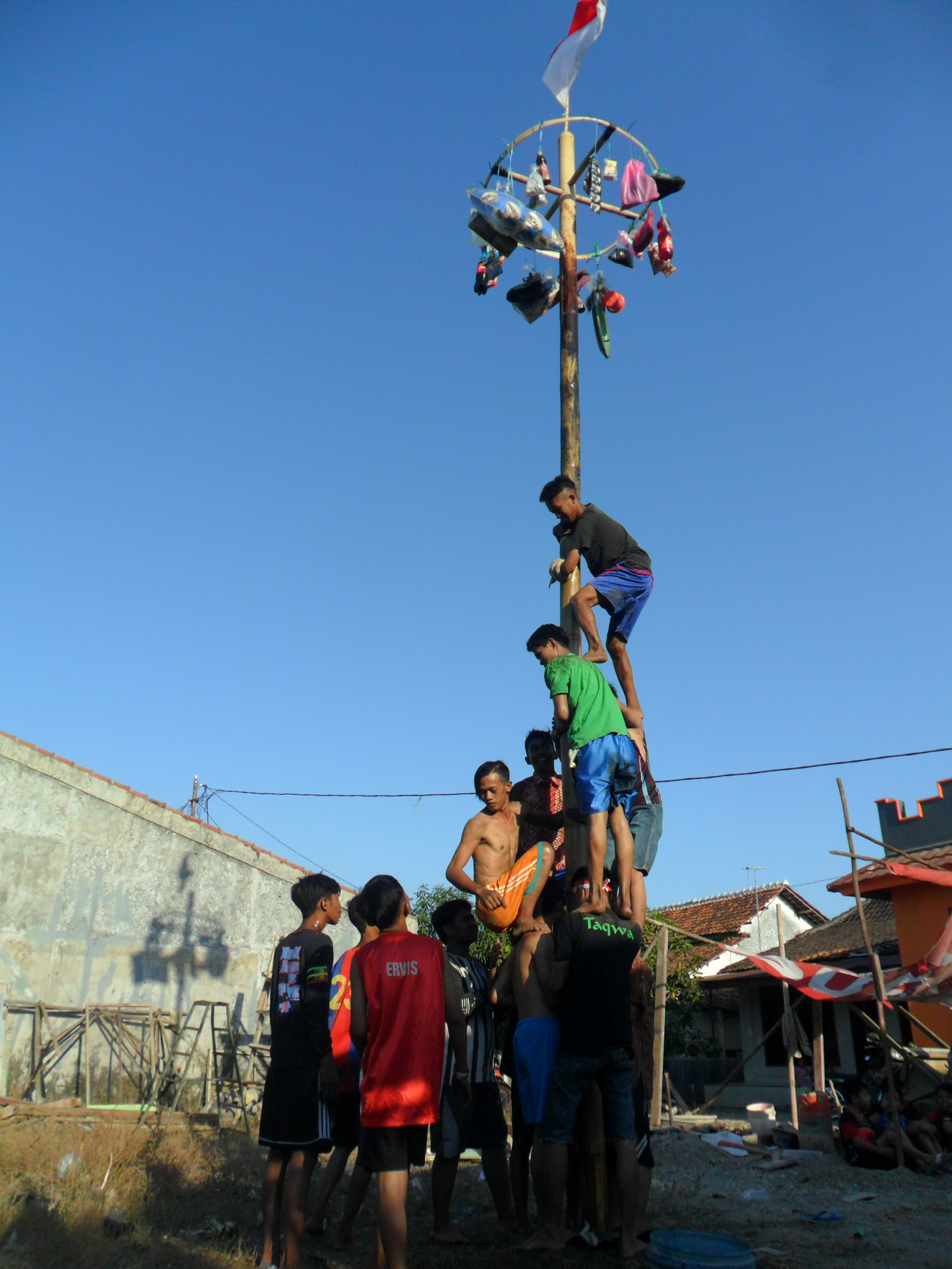 Lomba panjat 17an